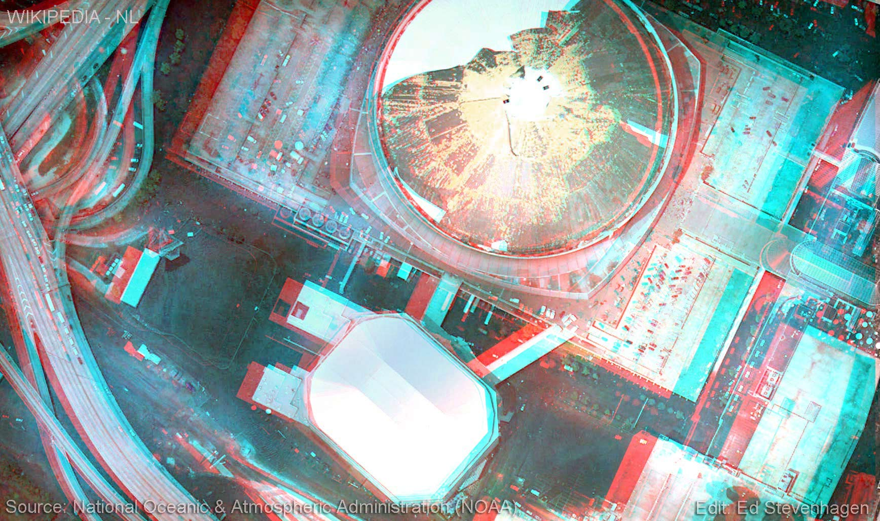 Stereofoto van de Superdome te New Orleans. Duidelijk te zien tot hoever het water nabij de dome staat.